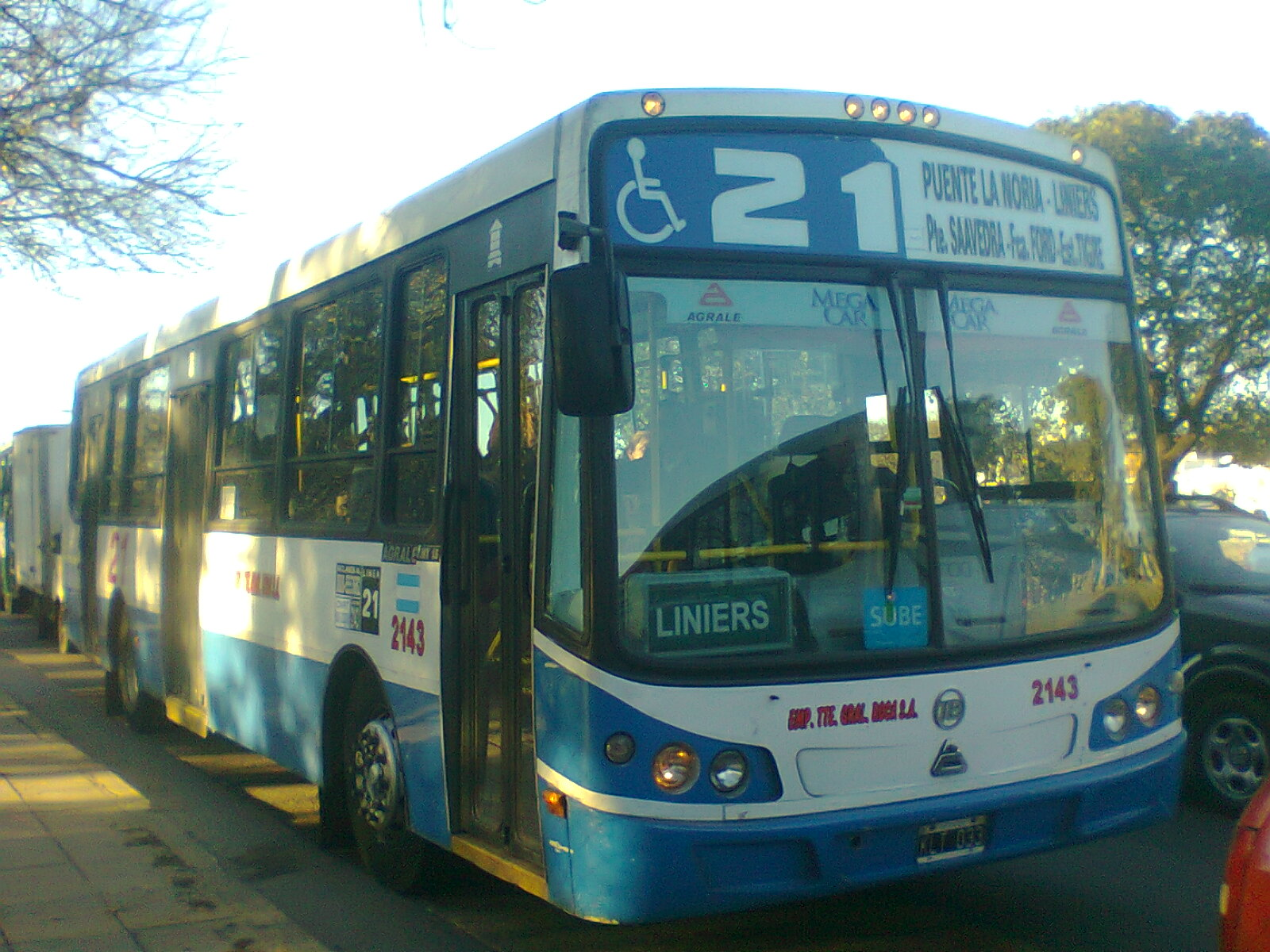 Unidad 2143 de la Línea 21 de Buenos Aires.